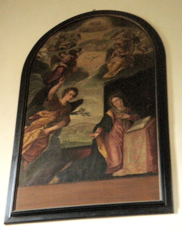 Conegliano: interno del Duomo, Annunciazione, tela del Pozzoserrato.